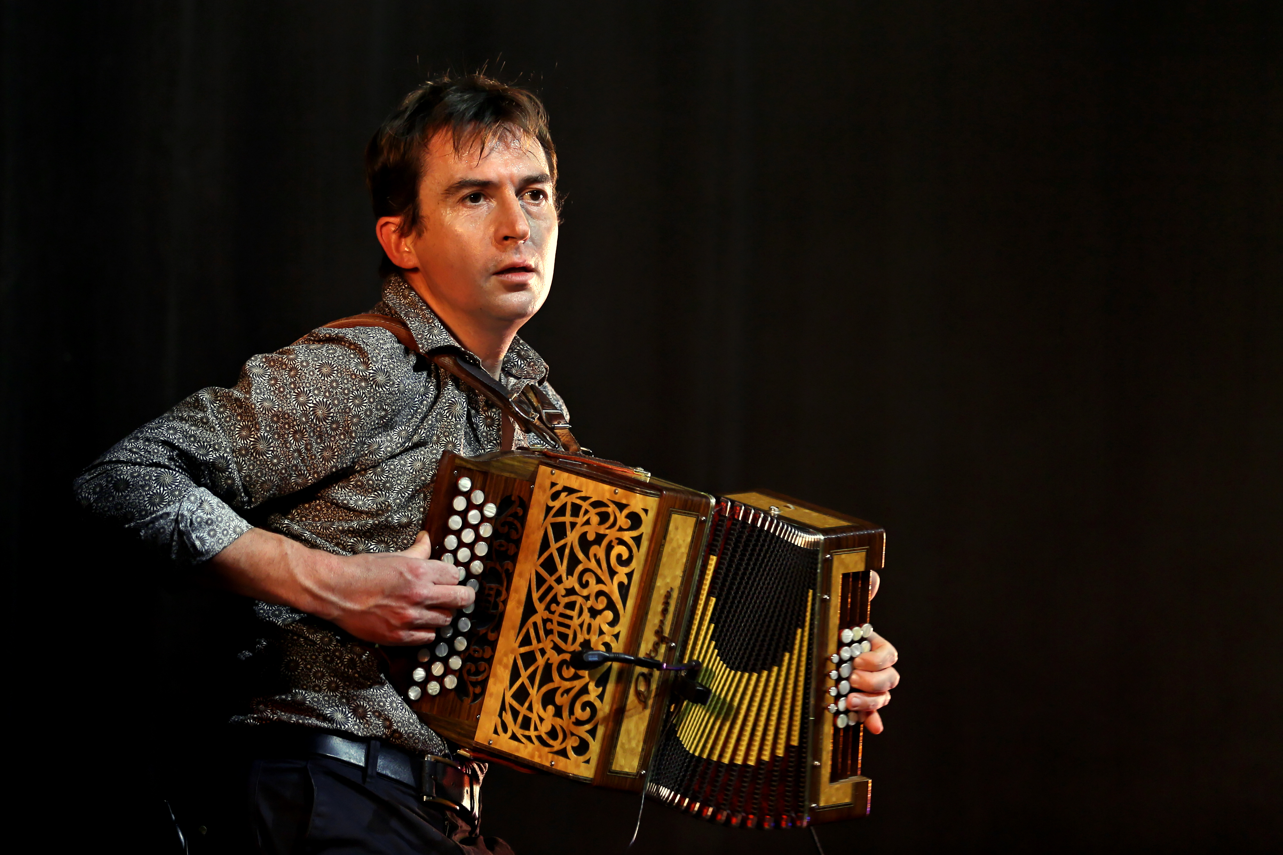 Rozenn Talec et Yannig Noguet en fest-noz lors du festival Yaouank le 21 novembre 2015 au Parc des Expositions de Rennes.